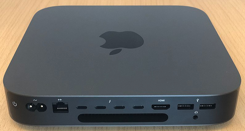 Rückseite des Mac mini 2018 mit allen Anschlüssen